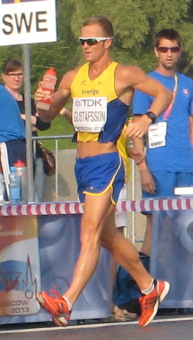 Чемпионат мира по лёгкой атлетике 2013. Ходьба 50 км, мужчины. Пелотон